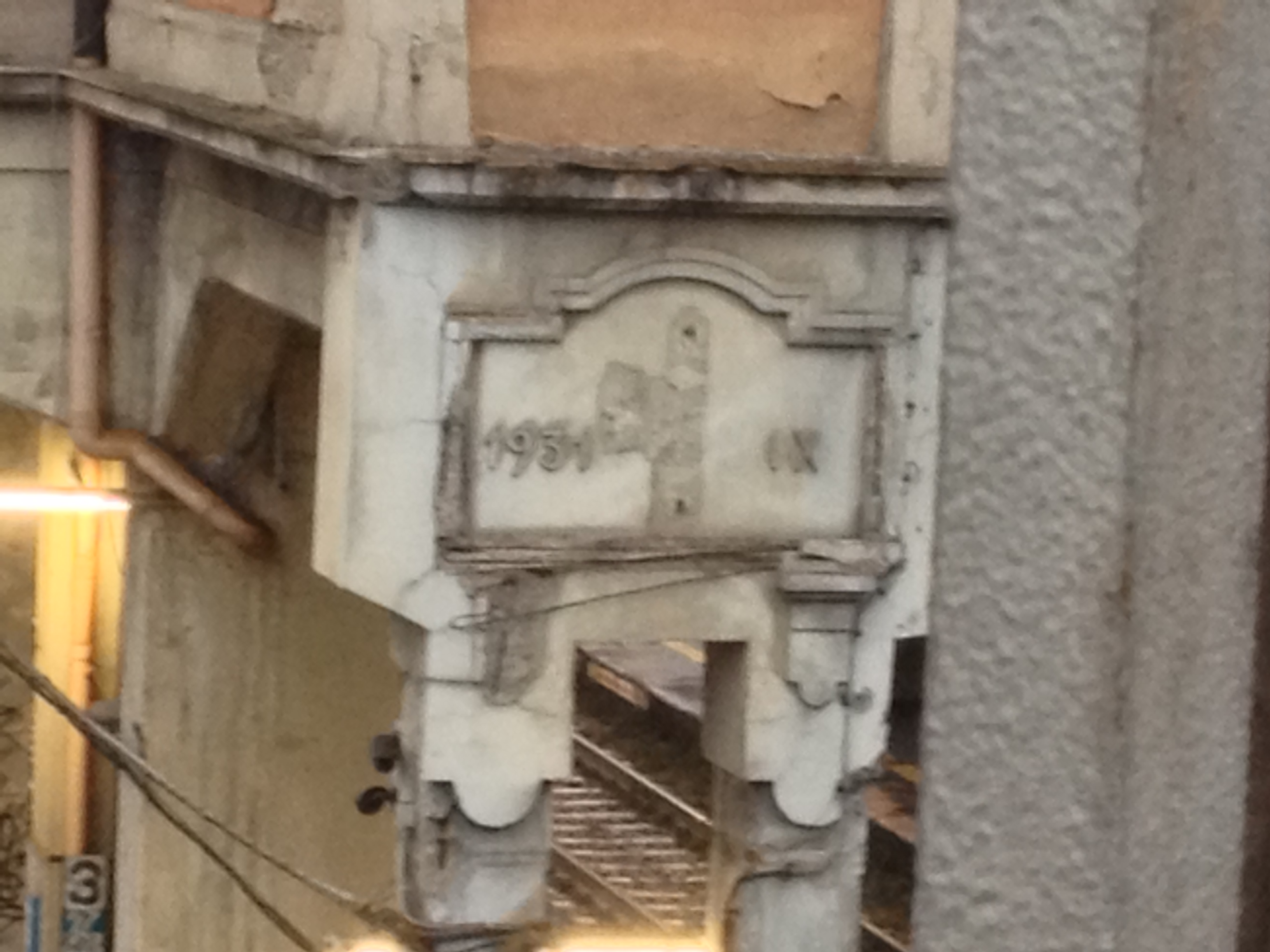 Dettaglio del fabbricato viaggiatori della stazione di Porta Romana FS. Si notino l'anno di costruzione (1931), il riferimento al nono anno di dittatura fascista (IX) e, al centro, è evidente la sagoma di un fascio littorio, poi rimosso.